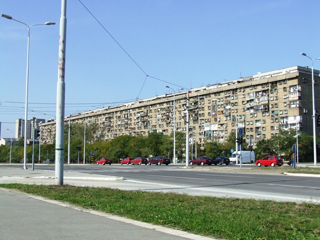 "Телевизорка", једна од две идентичне зграде, које су заштитни знак једног од најстаријих блокова '- блока 28